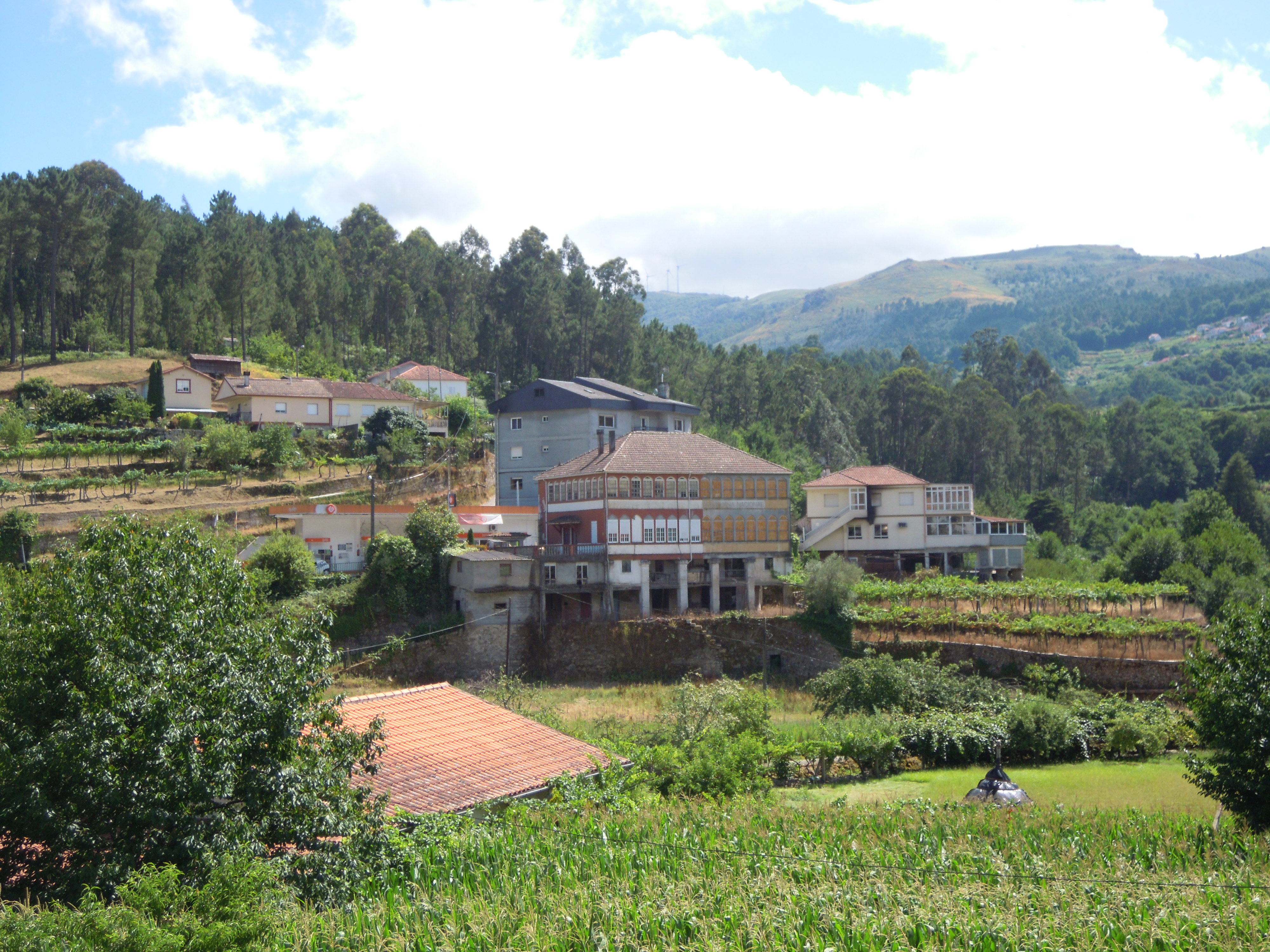 Vista de Ponte Barxas (Padrenda)